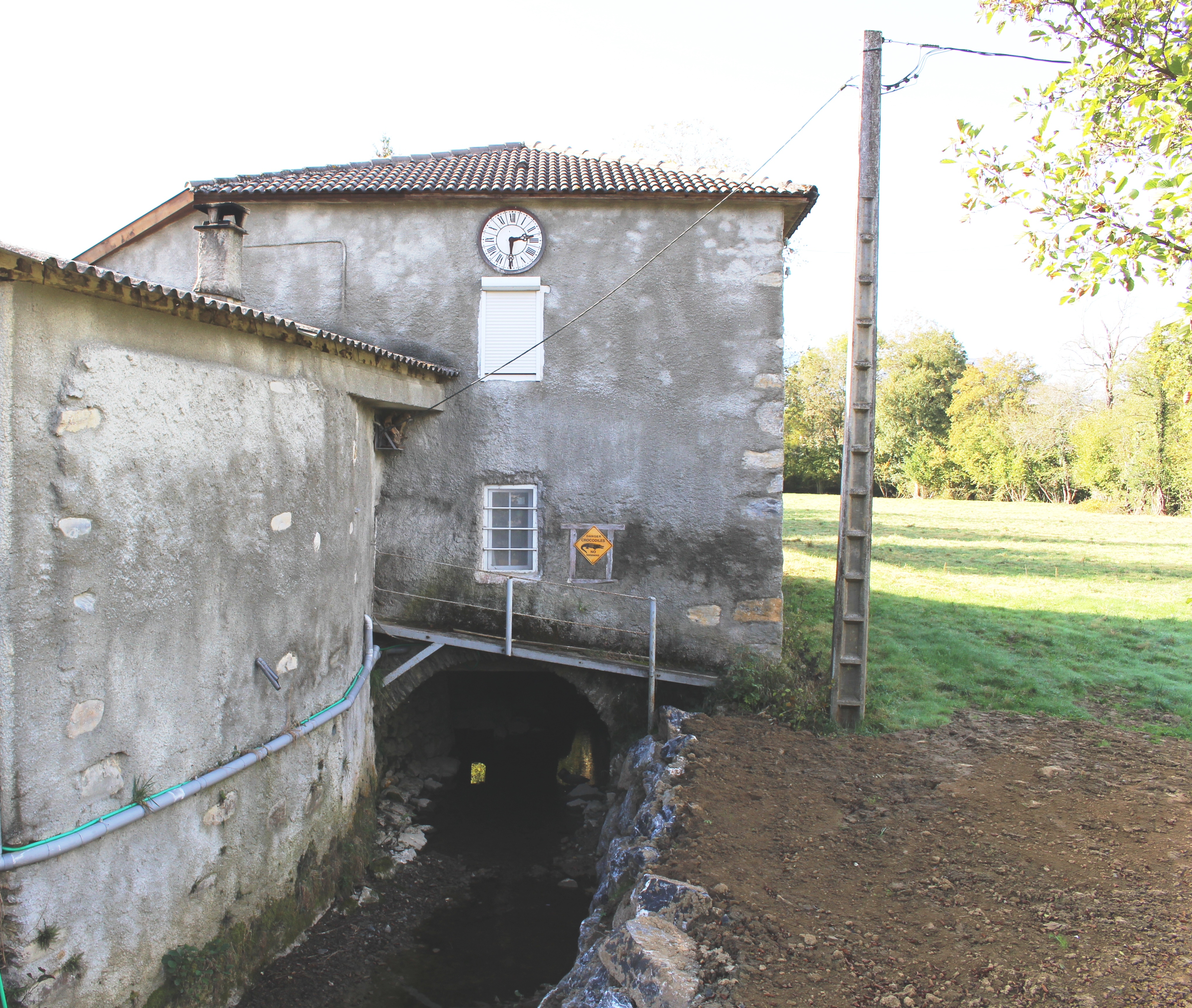 Moulin de Montsérié (Hautes-Pyrénées)